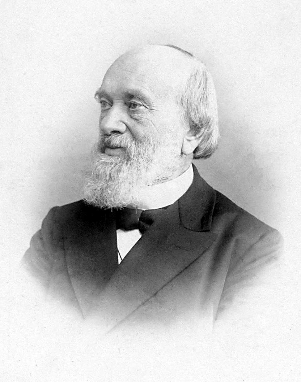 Foto uit de Bijzondere Collecties , Universiteit Leiden